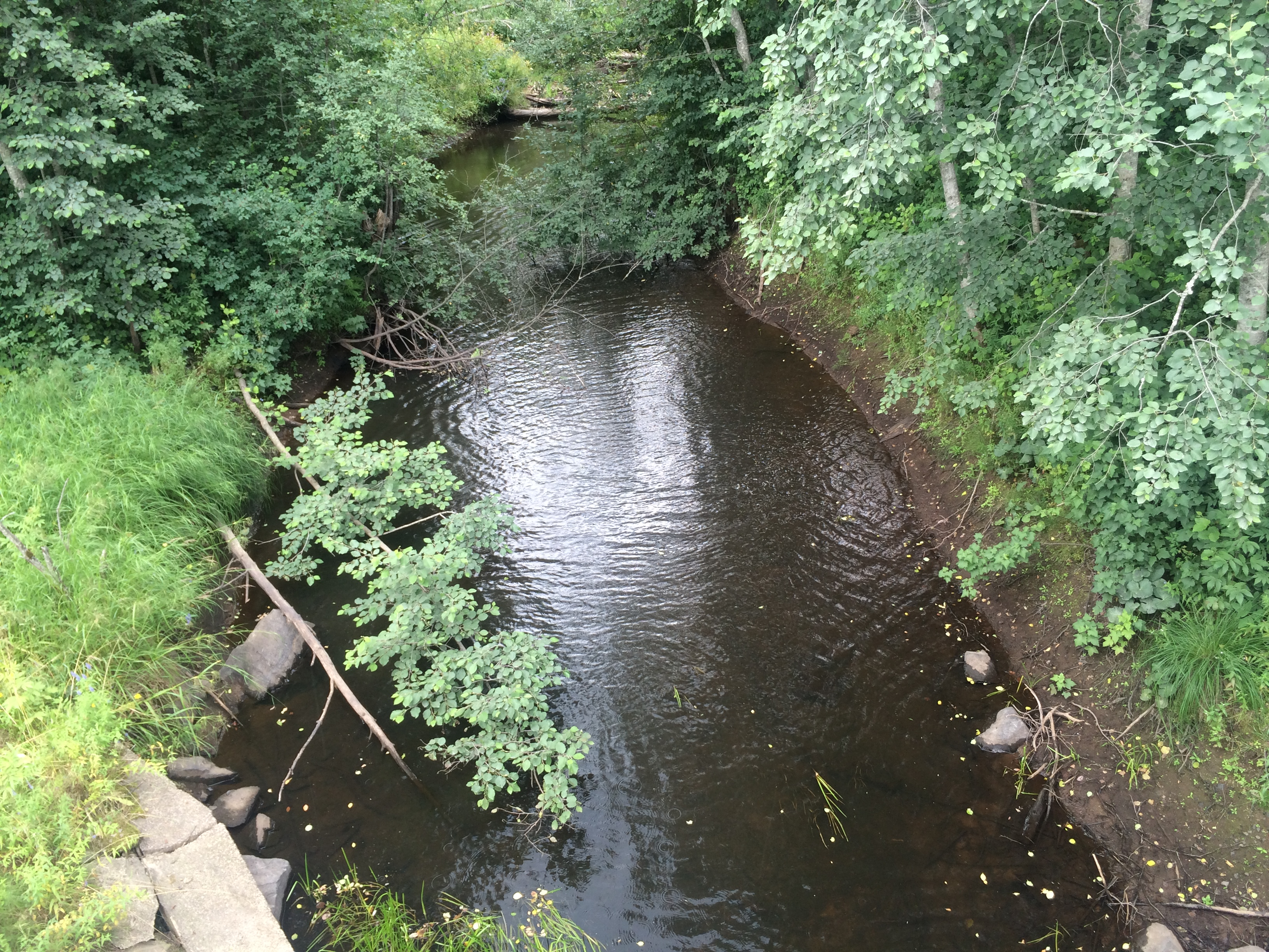 река Пяля